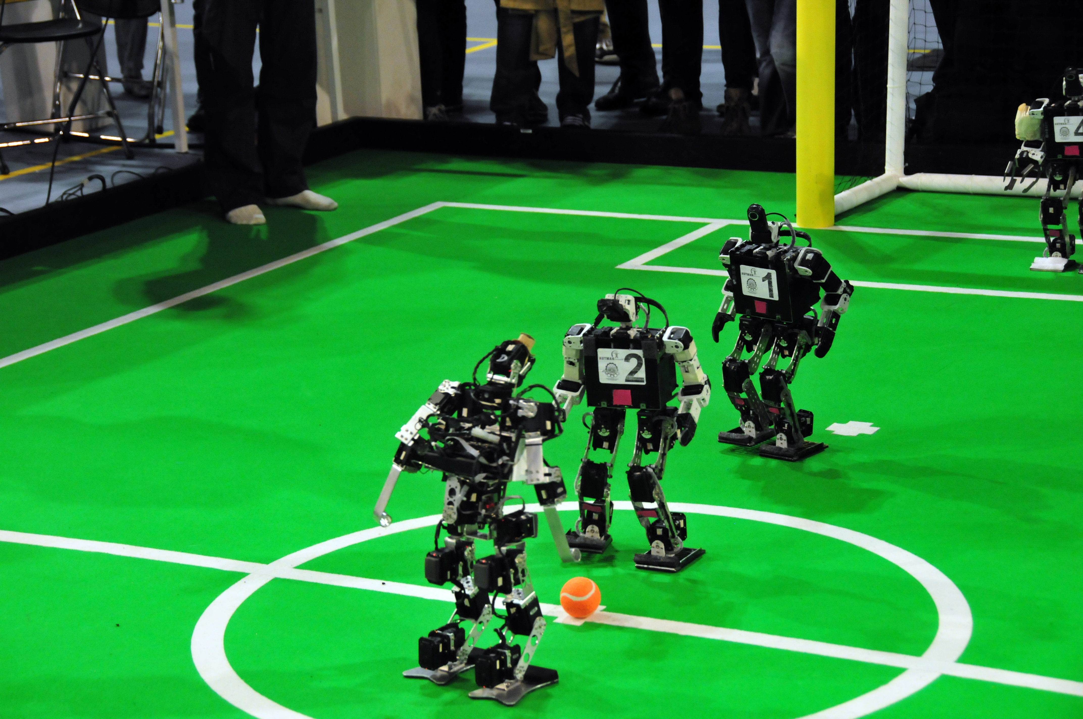 Eindhoven, Niederlande, Robocup 2013